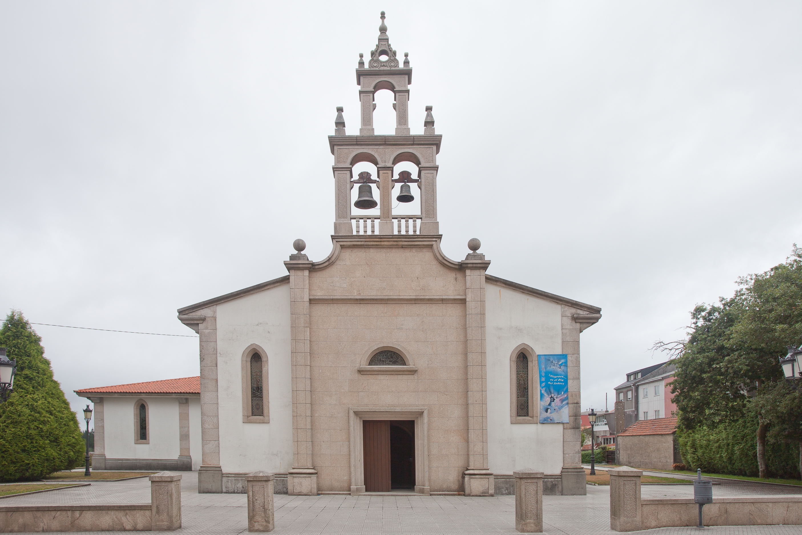 Igrexa de Santa María de Lurdes, Curtis, Galiza.